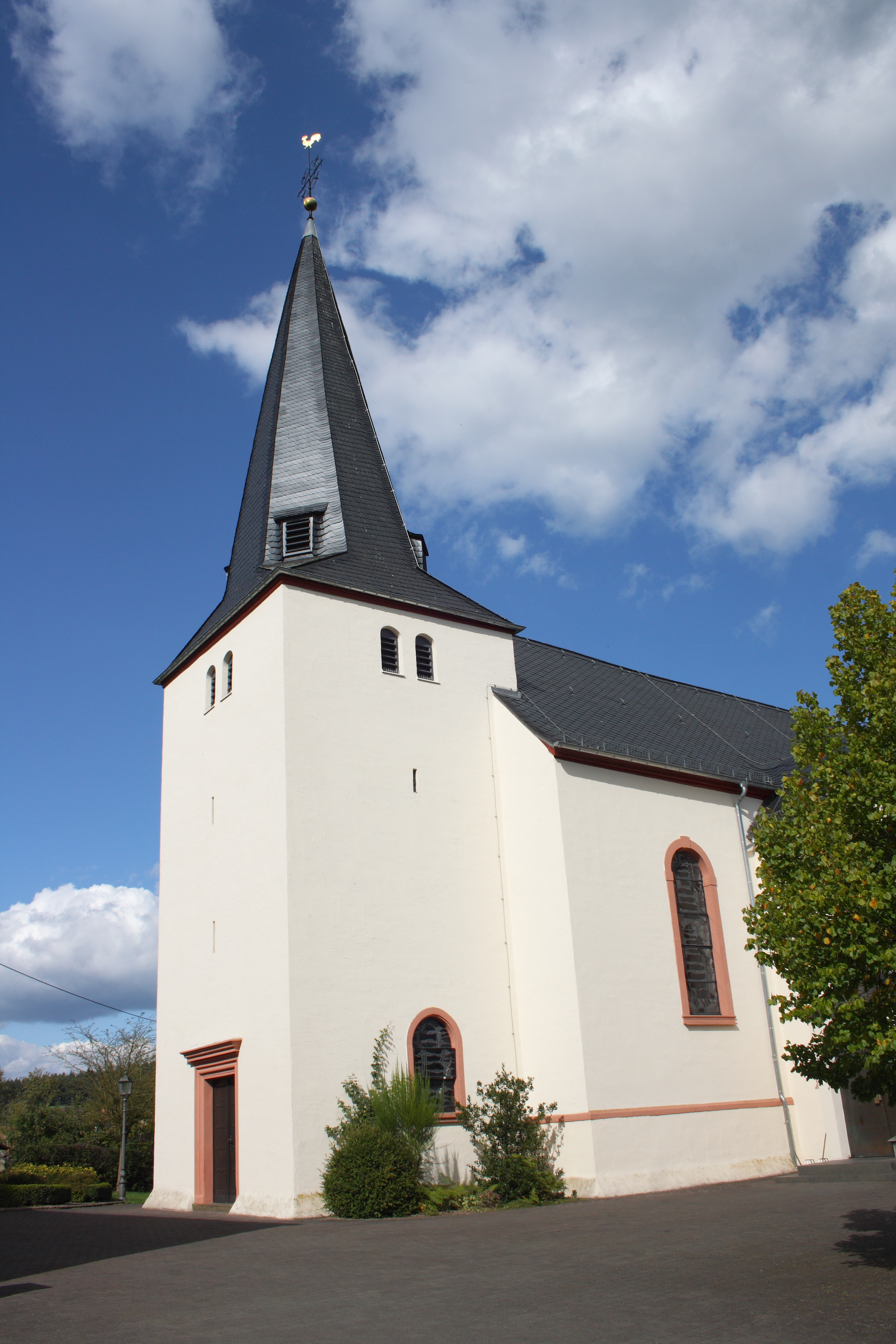 katholische Pfarrkirche St. Michael in Oberkail im Eifelkreis Bitburg-Prüm (Rheinland-Pfalz)